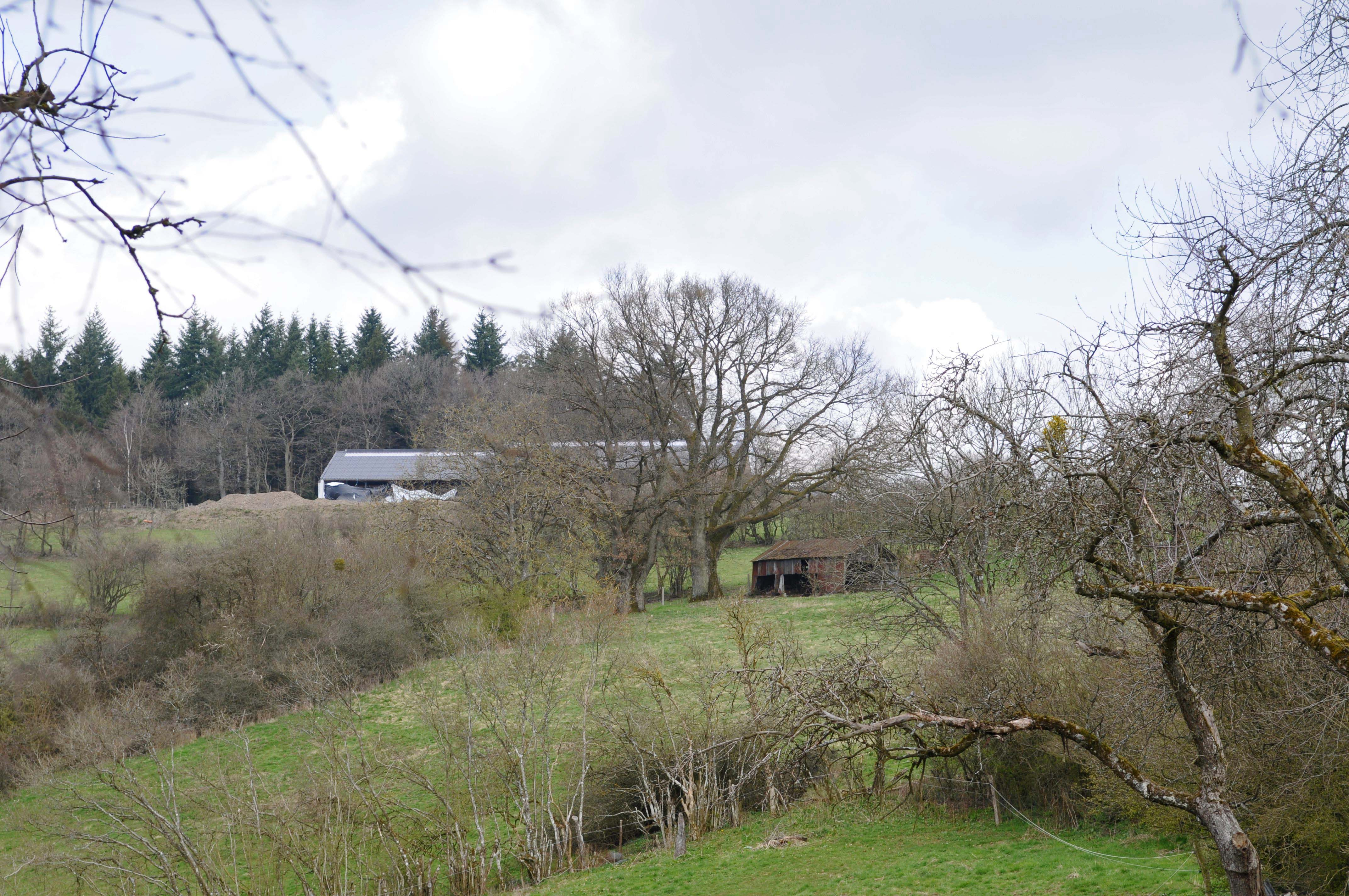 Eechen zuu Munzen. Munzen + Kategorie:Gemeng Munzen